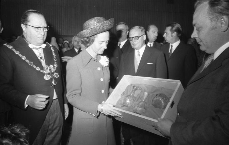 Staatsbesuch des belgischen Königspaares Eintragung in das Goldene Buch der Stadt Köln (links: Dr. h. c. Theo Burauen, Oberbürgermeister)